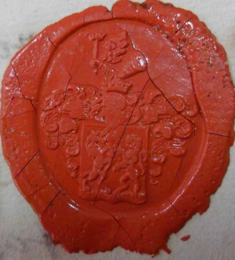 lovászi és szentmargitai Sümeghy József (1757-1832) zalai alispán címeres viaszpecsétje